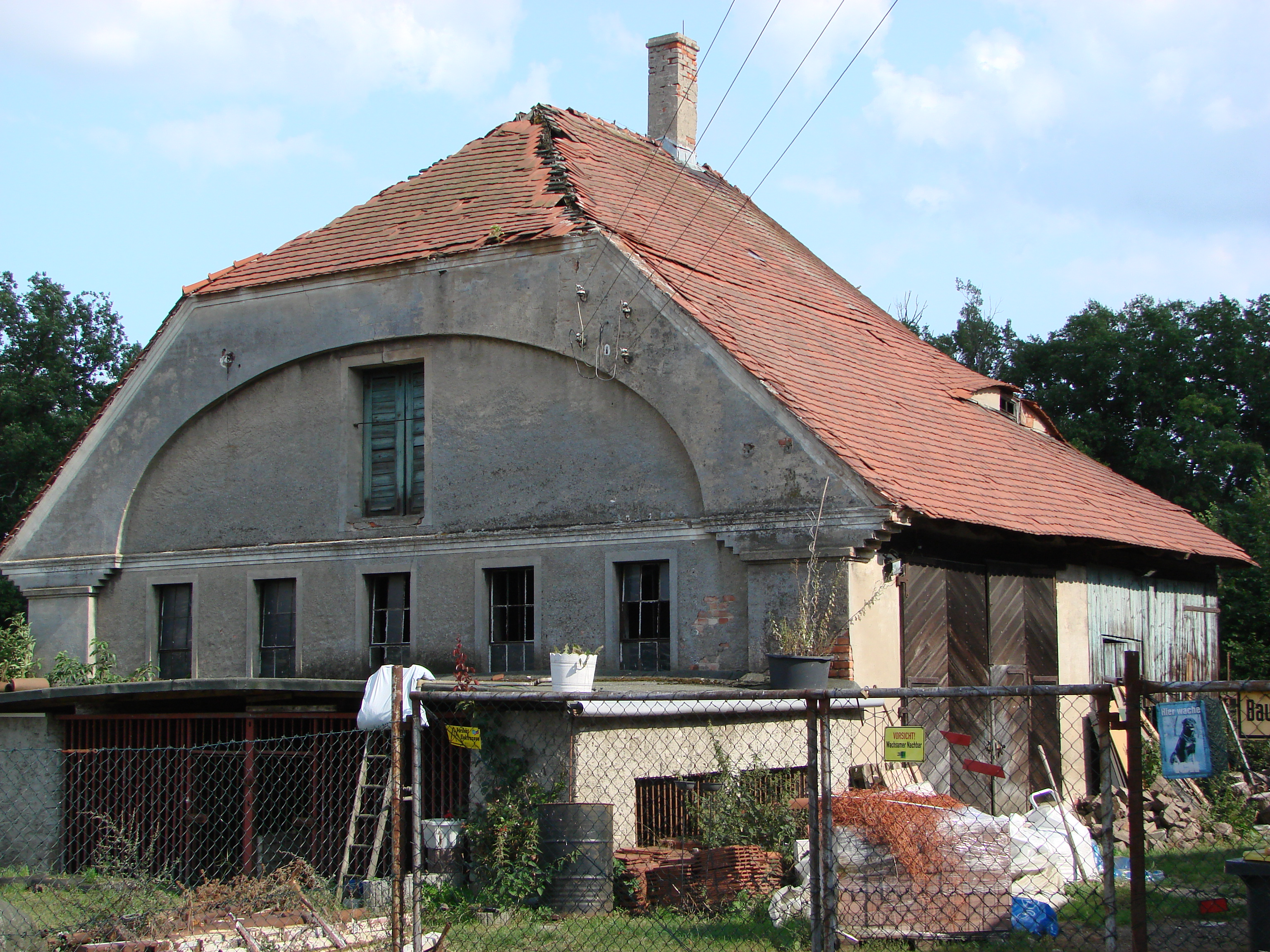 dieses Gebäude war eine alte Schmiede